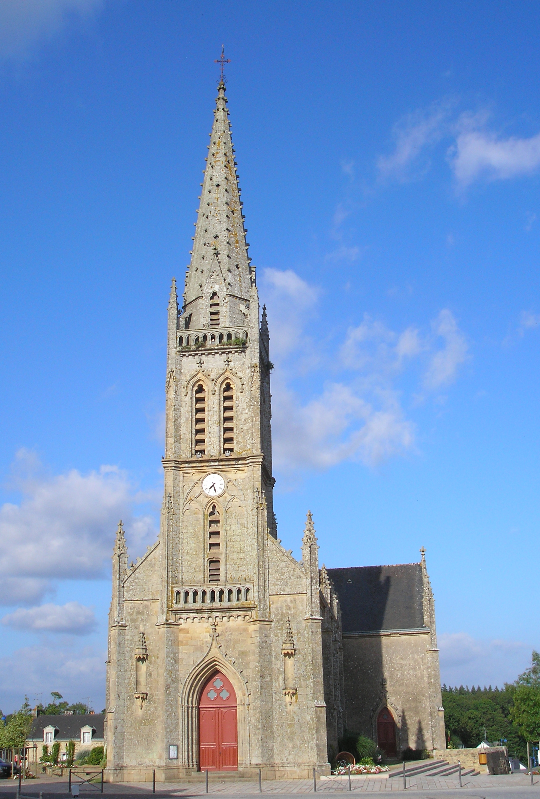 Pluneret (Bretagne, France). L'église Saint-Pierre-et-Saint-Paul.